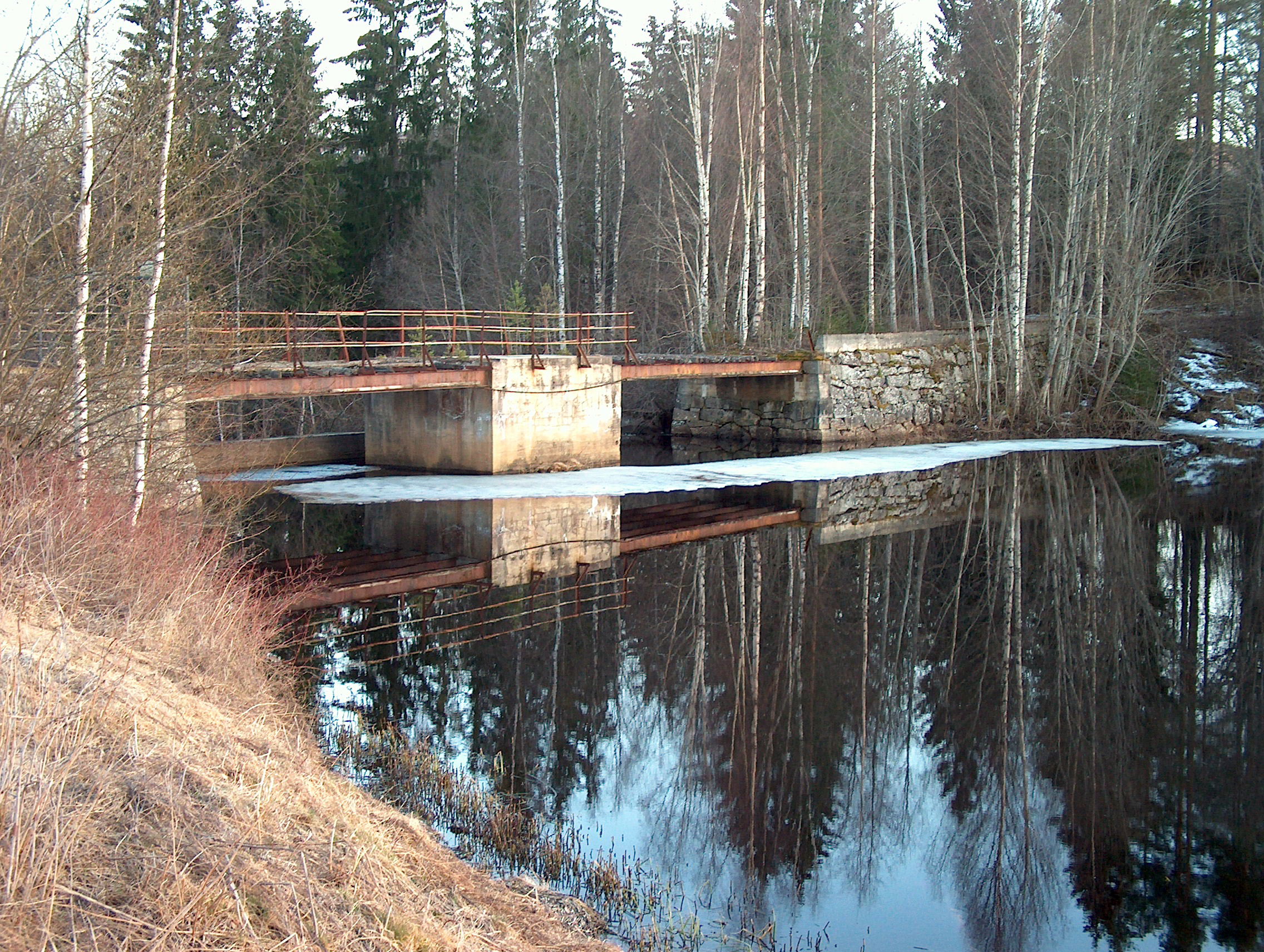 Verkenselva (Gamle riksvei 7) i Rudsvassdraget